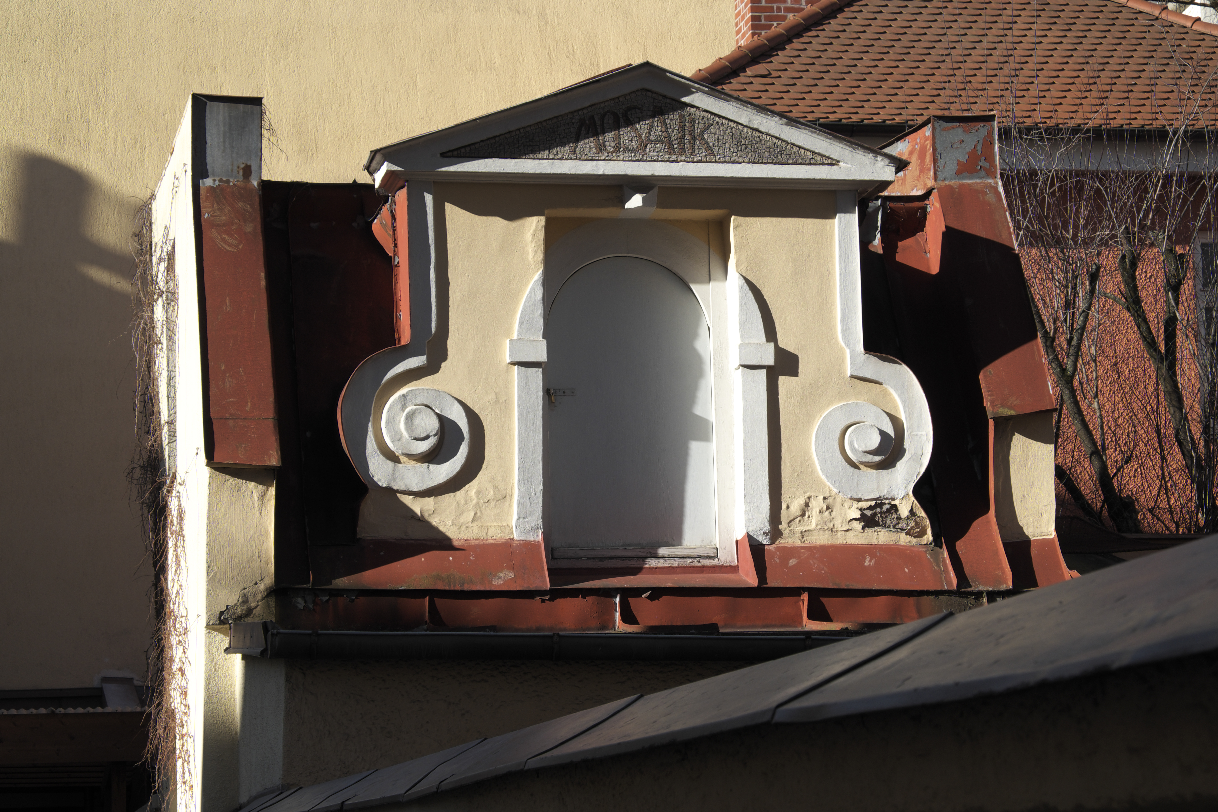 Mietshaus in der Parkstraße 24 im Stadtbezirk Schwanthalerhöhe in München (Bayern/Deutschland), Hinterhof